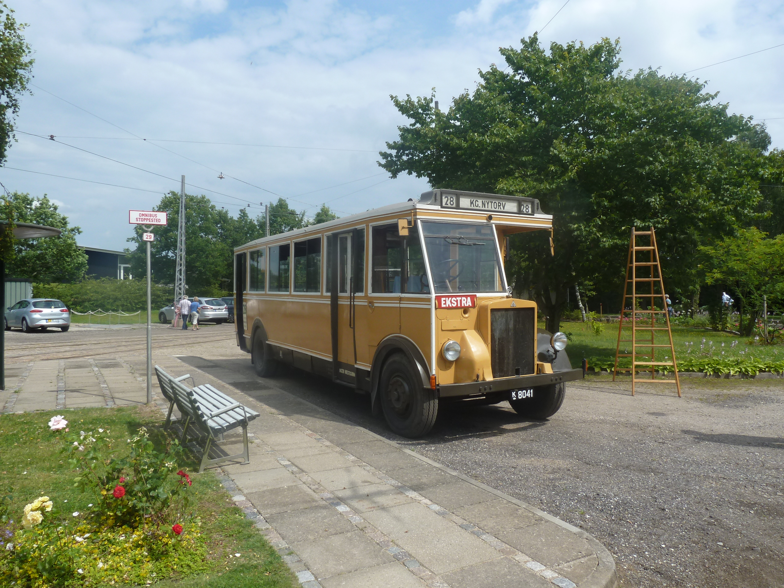 Old bus from Copenhagen, KS 41, Sporvejsmuseet Skjoldenæsholm in Denmark.